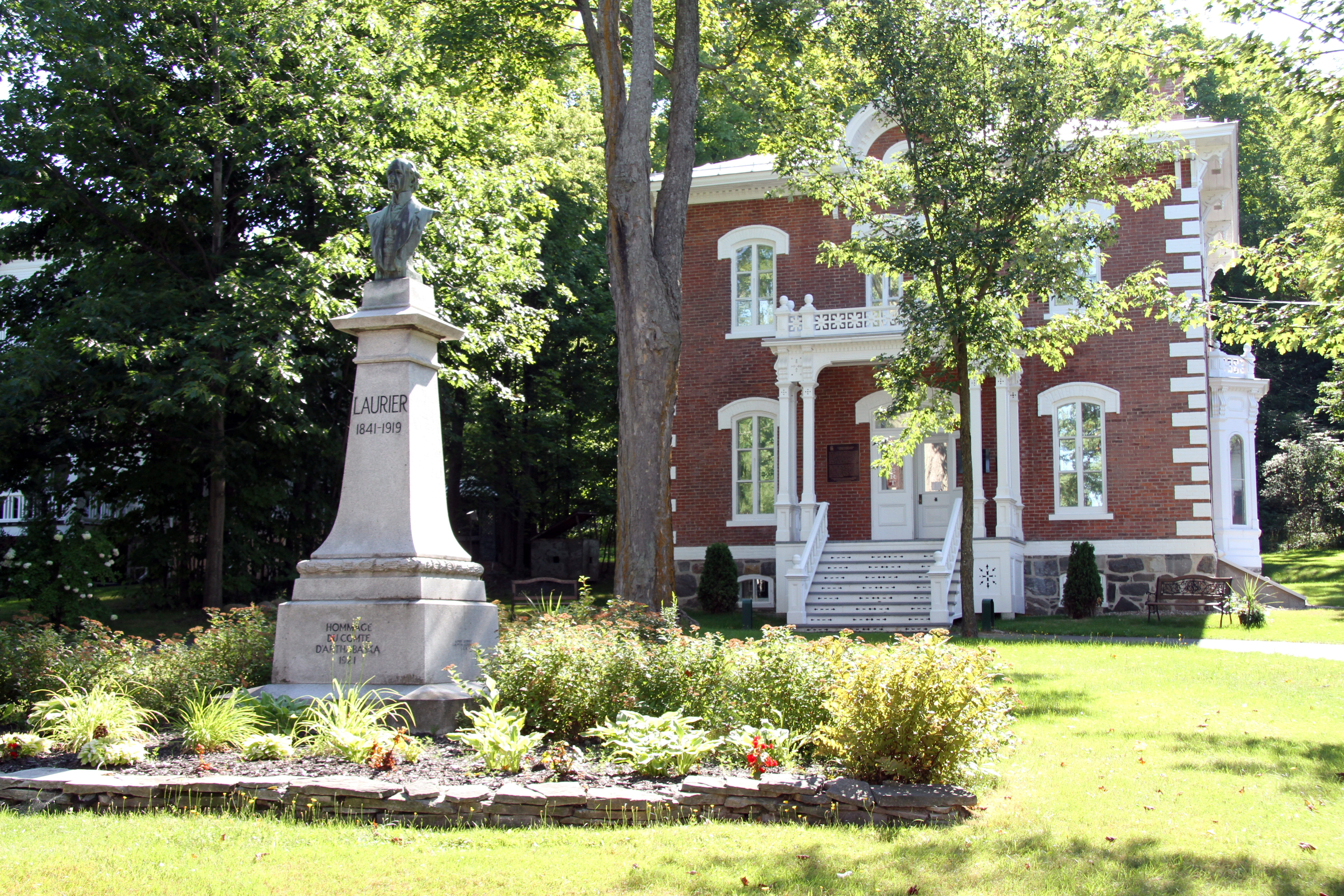 Maison Wilfrid-Laurier à Victoriaville, Quebec.